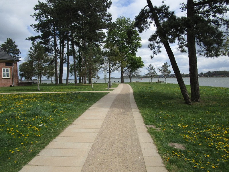 Sti i Slesvig-Friheden